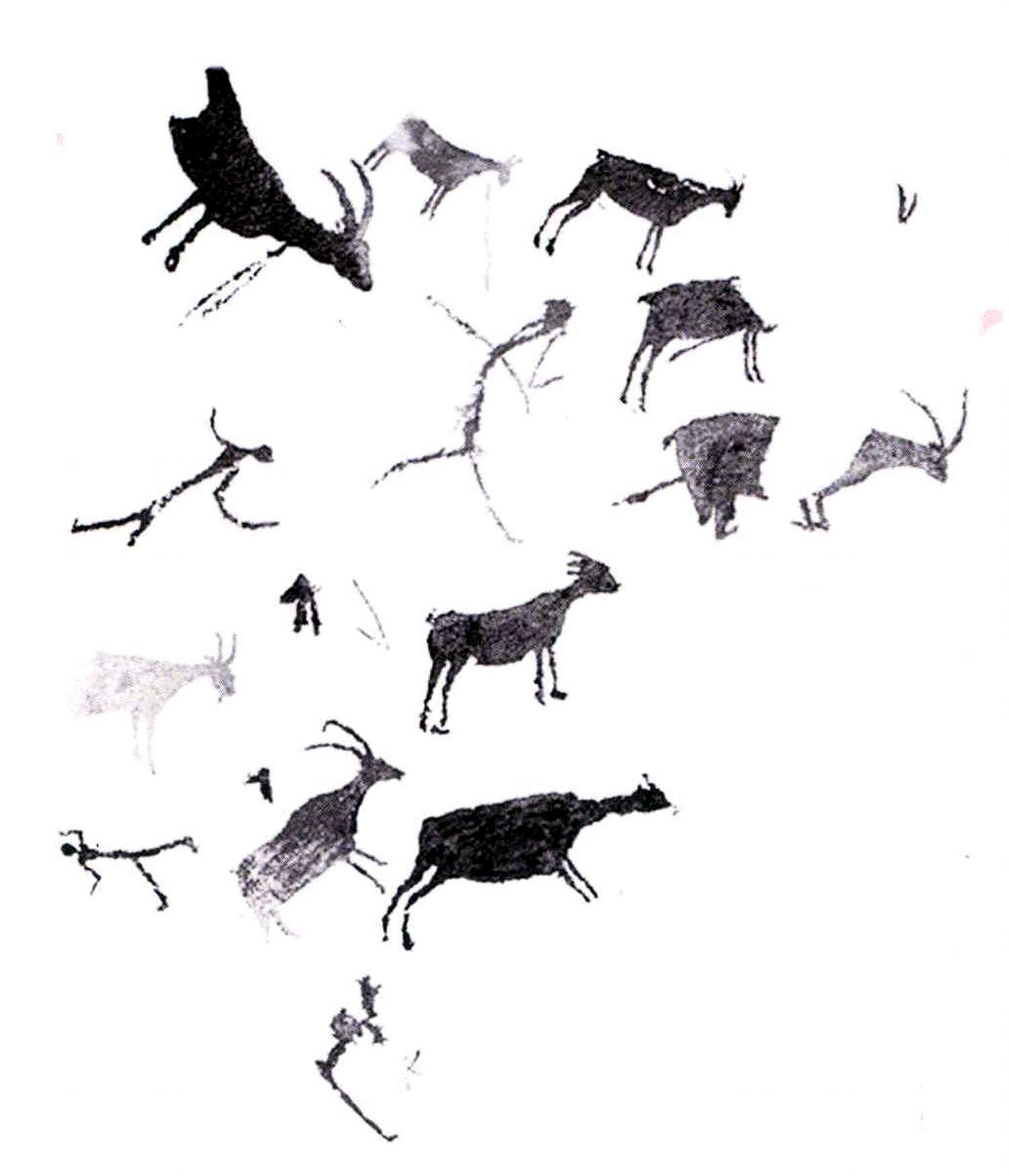 Detalle del panel decorado (en negativo) del abrigo de las Cabras Blancas en Tormón, Parque Cultural de Albarracín (2018).